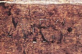 M S mester monogramja a Feltámadás c. képén